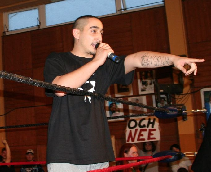 HipHop-Musiker Eko Fresh bei einem Wrestling-Wettkampf im Siedlerheim Mannheim-Schönau